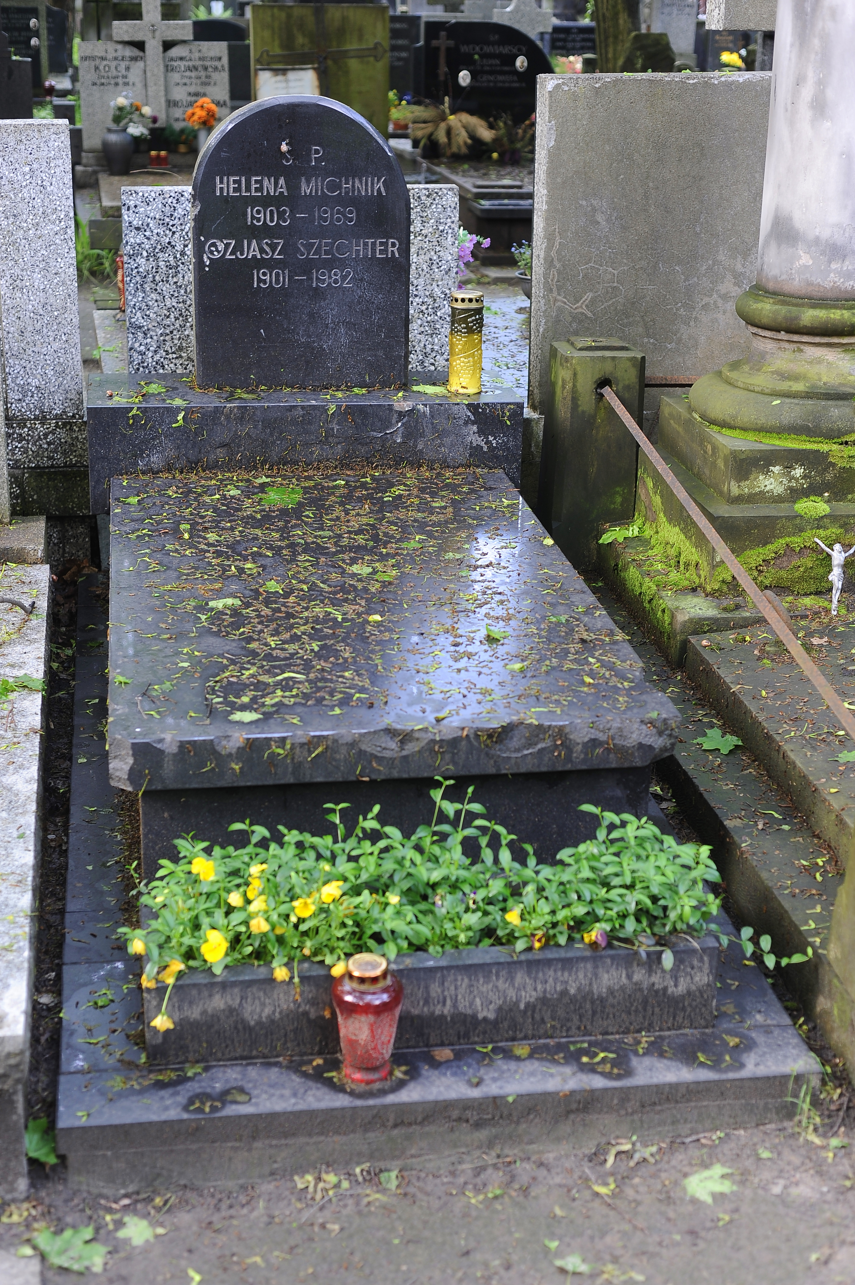 Grób Heleny Michnik i Ozjasza Szechtera na warszawskim Cmentarzu Powązkowskim